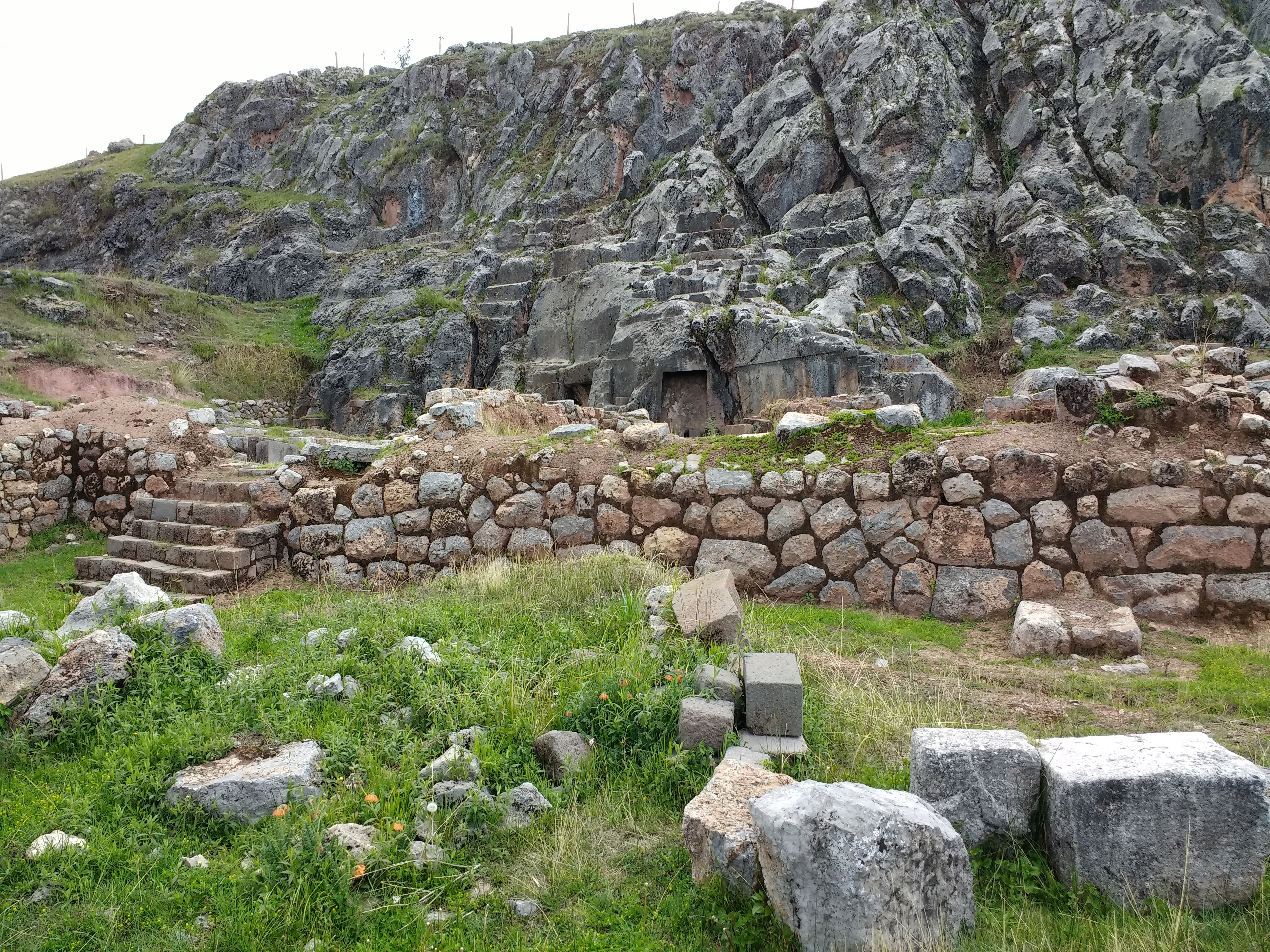 Una parte de Amaru Markawasi (Templo de la Luna), sitio arqueológico de Perú.